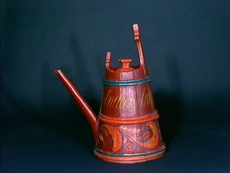 Tankar fra Sør-Trøndelag med innskrift Anders Anderssen Fugleaas 1841. Høyde 46 cm. Foto: Anne-Lise Reinsfelt, Norsk Folkemuseum, NF.1992-2894.